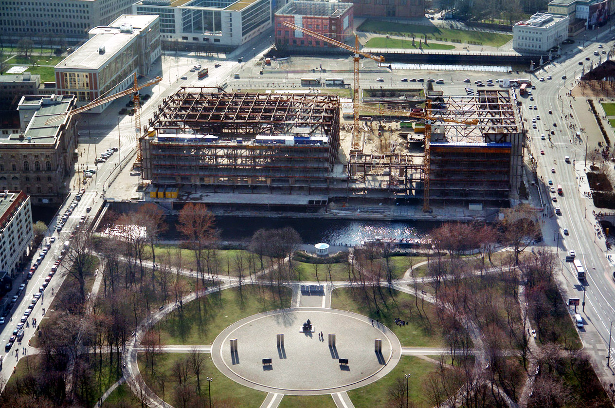 Palast der Republik (Demontage) vom Berliner Fernsehturm aus gesehen.